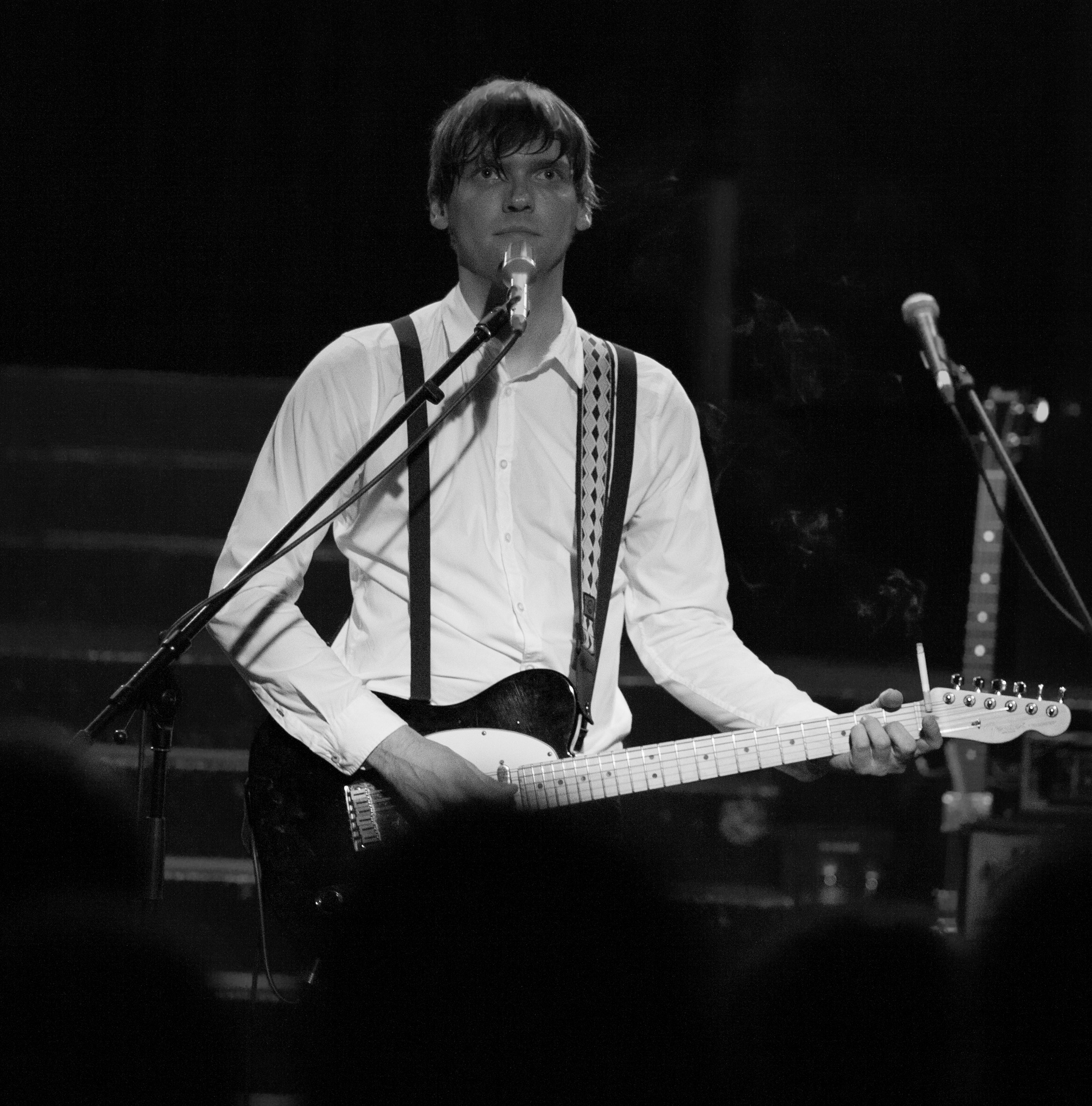 Oliver Gottwald, cropped version of File:Oliver Gottwald 2014.jpg